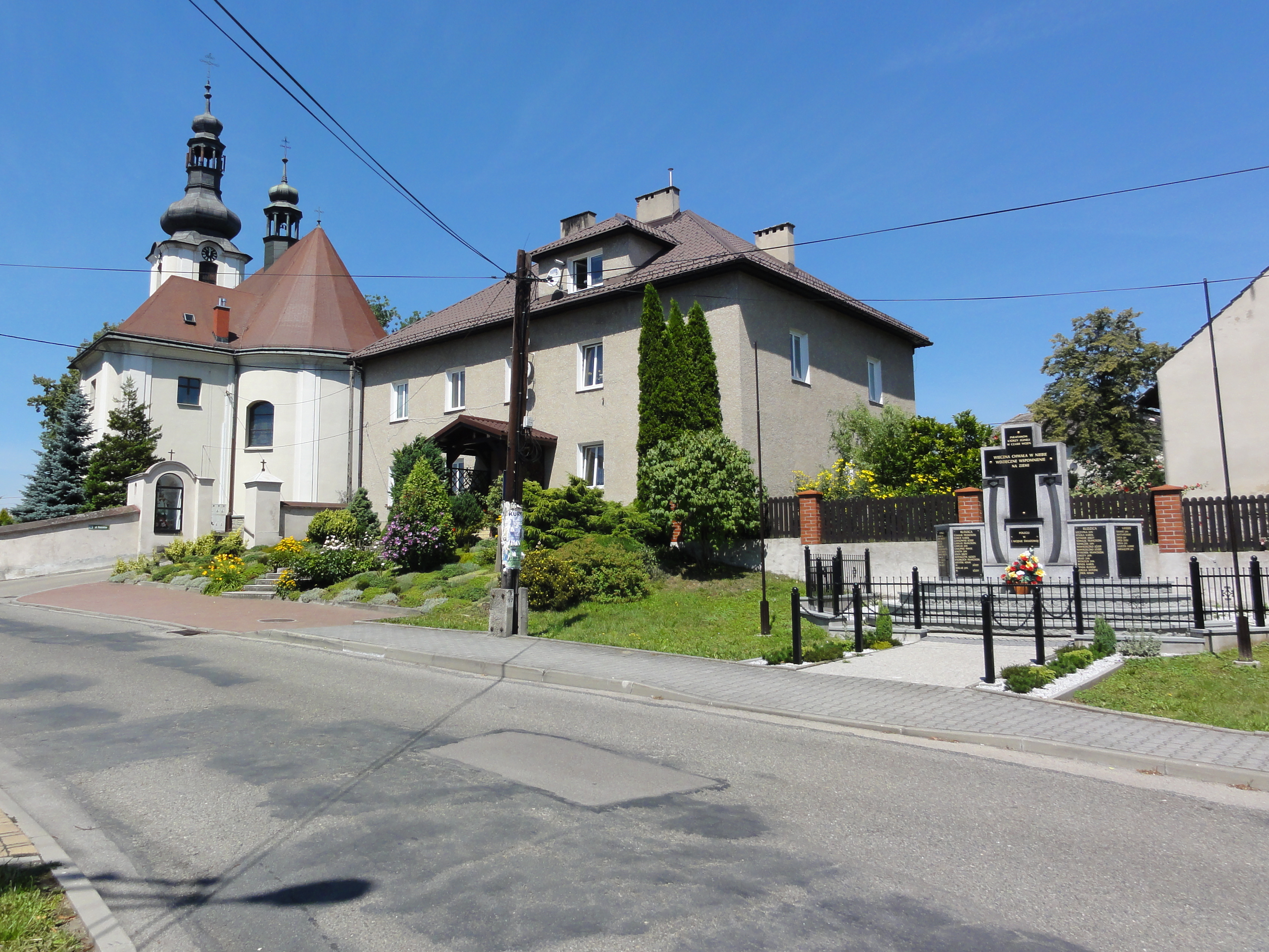 Od lewej kościół, plebania i pomnik w Rudzicy